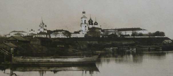 Yaroslavl Kremlin